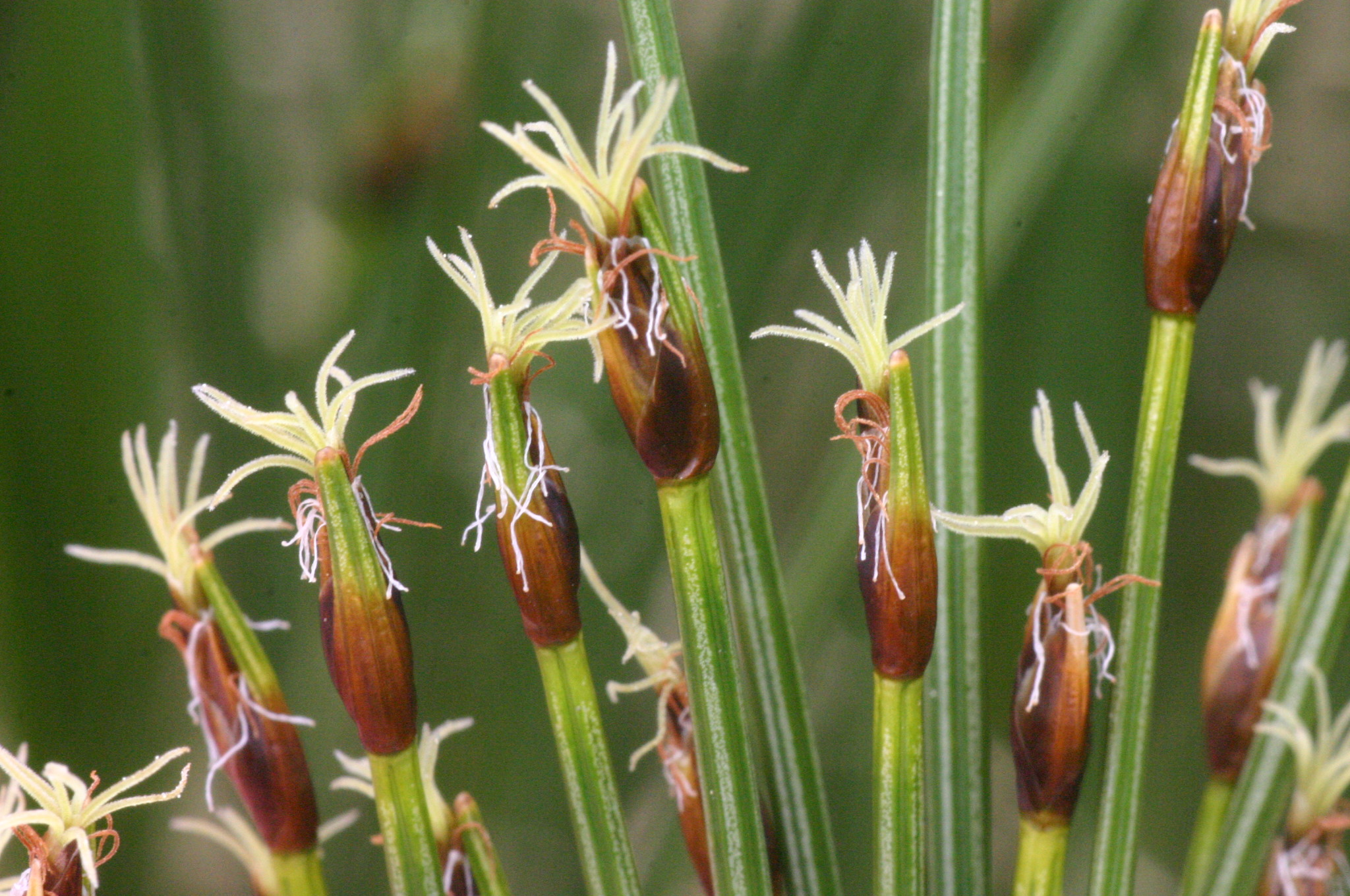 Trichophorum cespitosum (Rasen-Haarbinse) Aufnahmeort: Planneralm, Steiermark, Austria